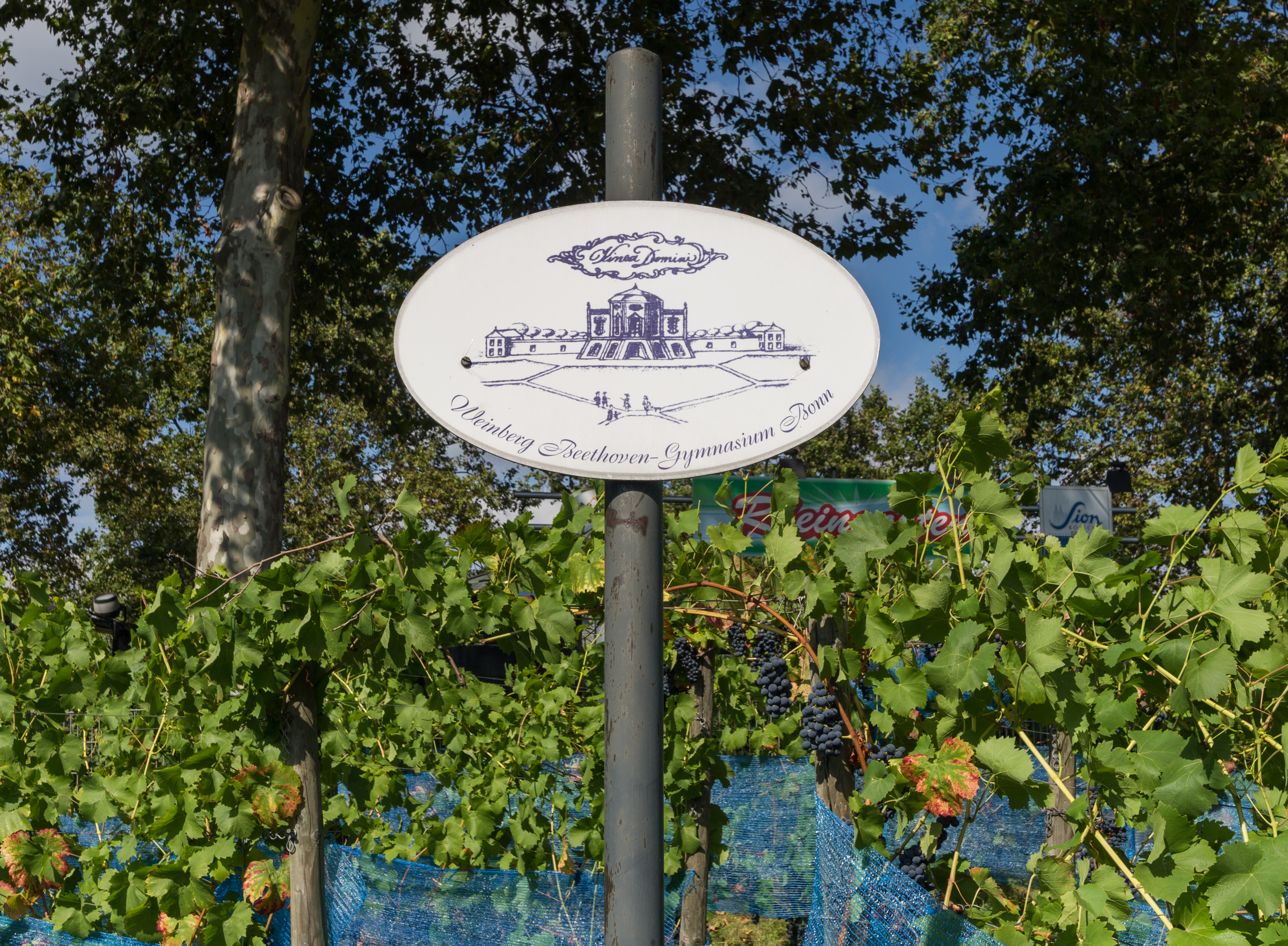 Vineyard, Rheinaue, Charles-de-Gaulle-Straße 53, Bonn, district Gronau